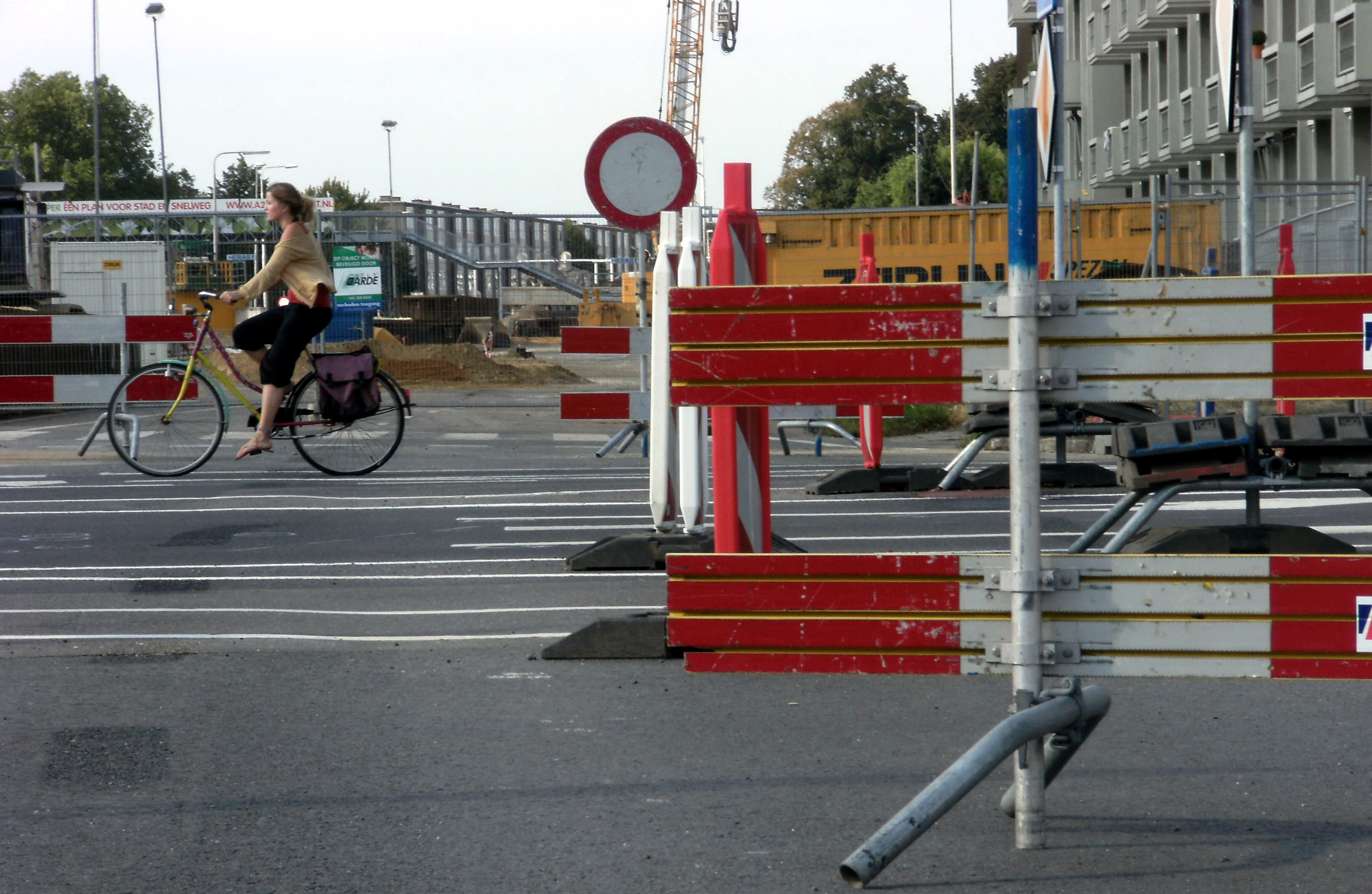 Maastricht 2012 werkzaamheden kruispunt A2 en Scharnerweg